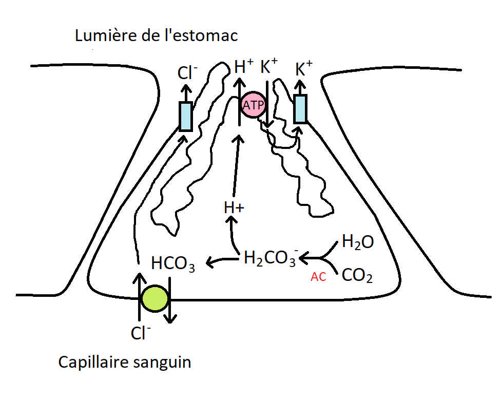 Cellule pariétale de l'estomac. AC : anydrase carbonique